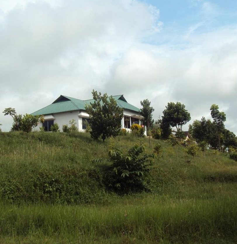 বাংলাদেশ স্কাউটস সিলেট আঞ্চলিক প্রশিক্ষণ কেন্দ্র।